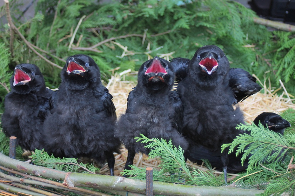 Nest jonge raven in Zoo Veldhoven, Nederland